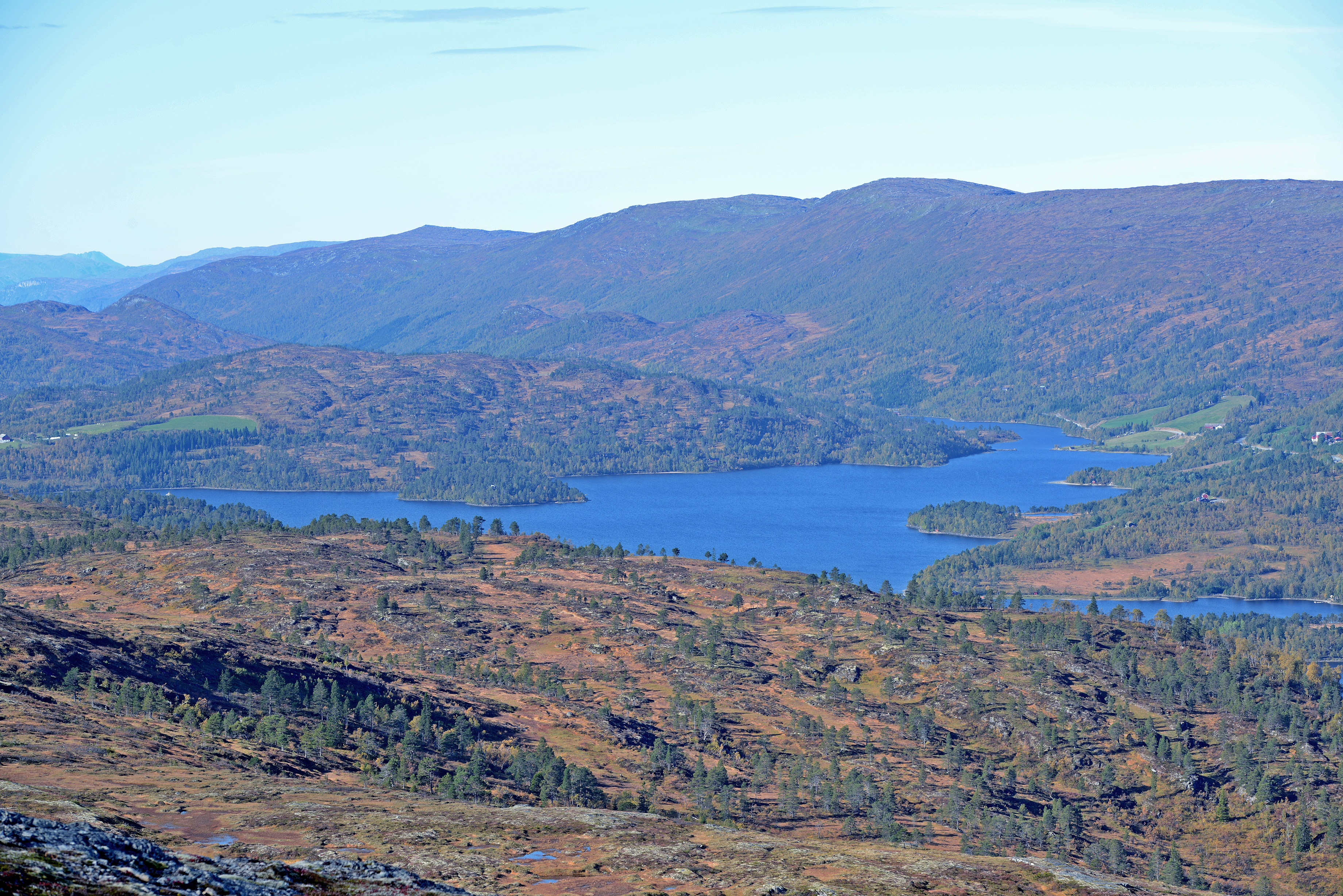 Søvatnett i Hemne kommune